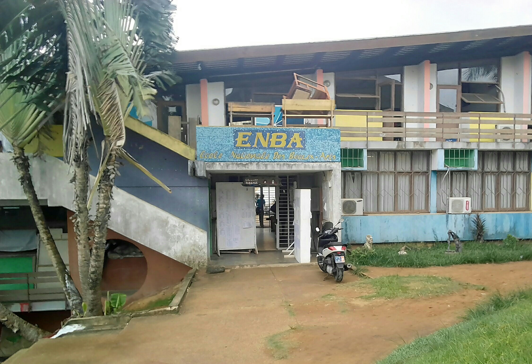 Ce fichier a été pris en accord avec la directrice de l'école des beaux-arts d'Abidjan, Mathilde Moreau. Cette école est située à Cocody précisément dans les locaux de l'Institut National Supérieur des Arts et de l'Action Culturelle (INSAAC). La directrice de cet établissement, nous donne sa permission pour la diffusion de ce fichier sous licence libre.